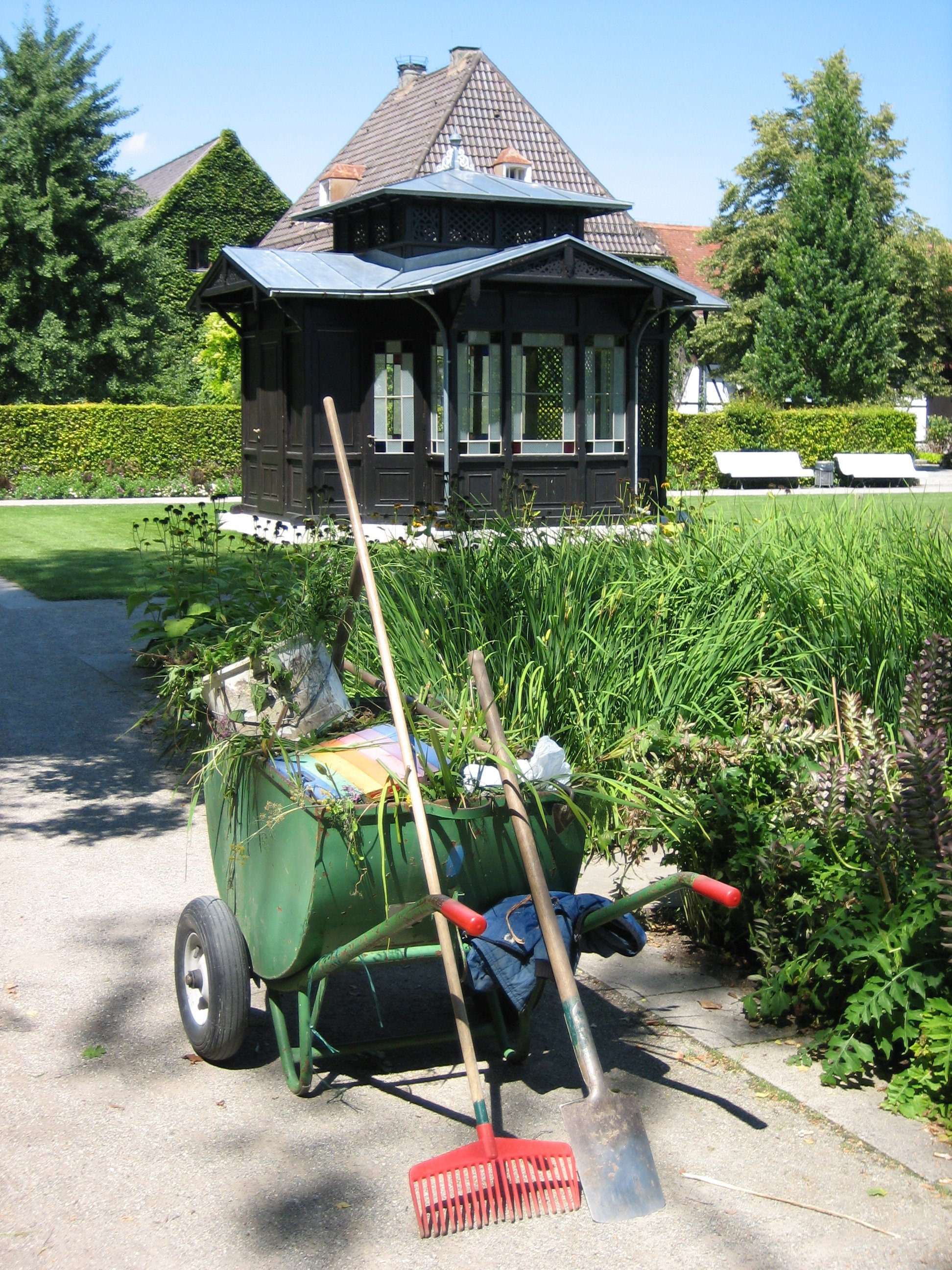 Botanischer Garten in Augsburg, ein Gärtner hat seine Geräte auf dem Weg zum Gartenpavillon abgestellt